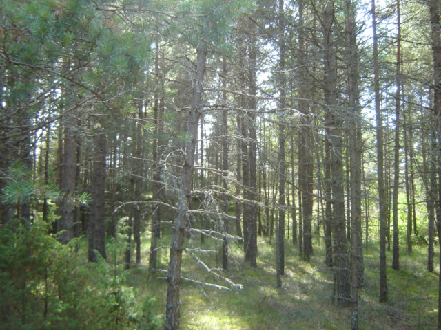 Kihelkonna maalinna vallid ja siseõu